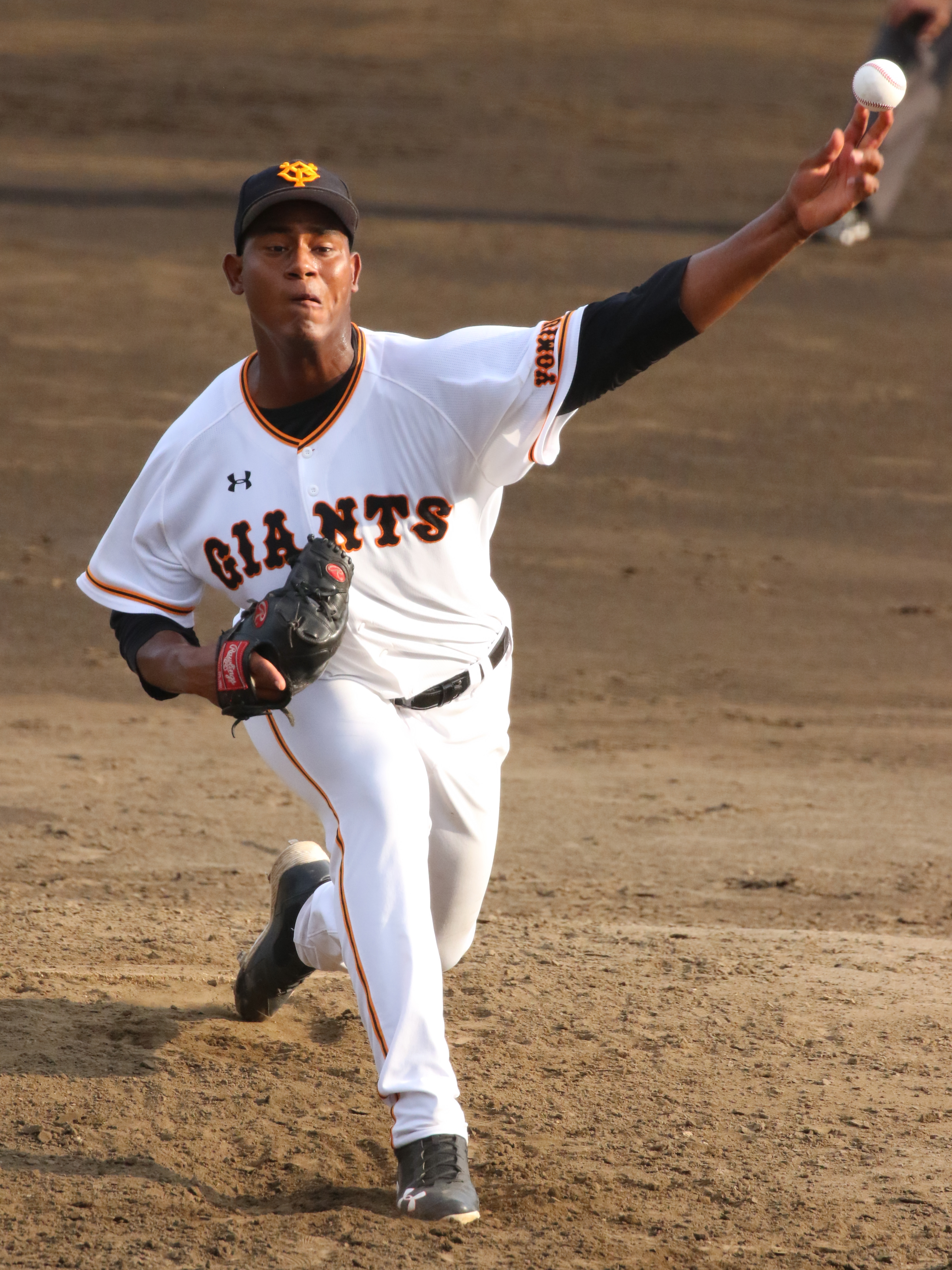 ジャイアンツメルセデス選手